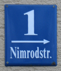 Beispiel für ein Hausnummernschild in München